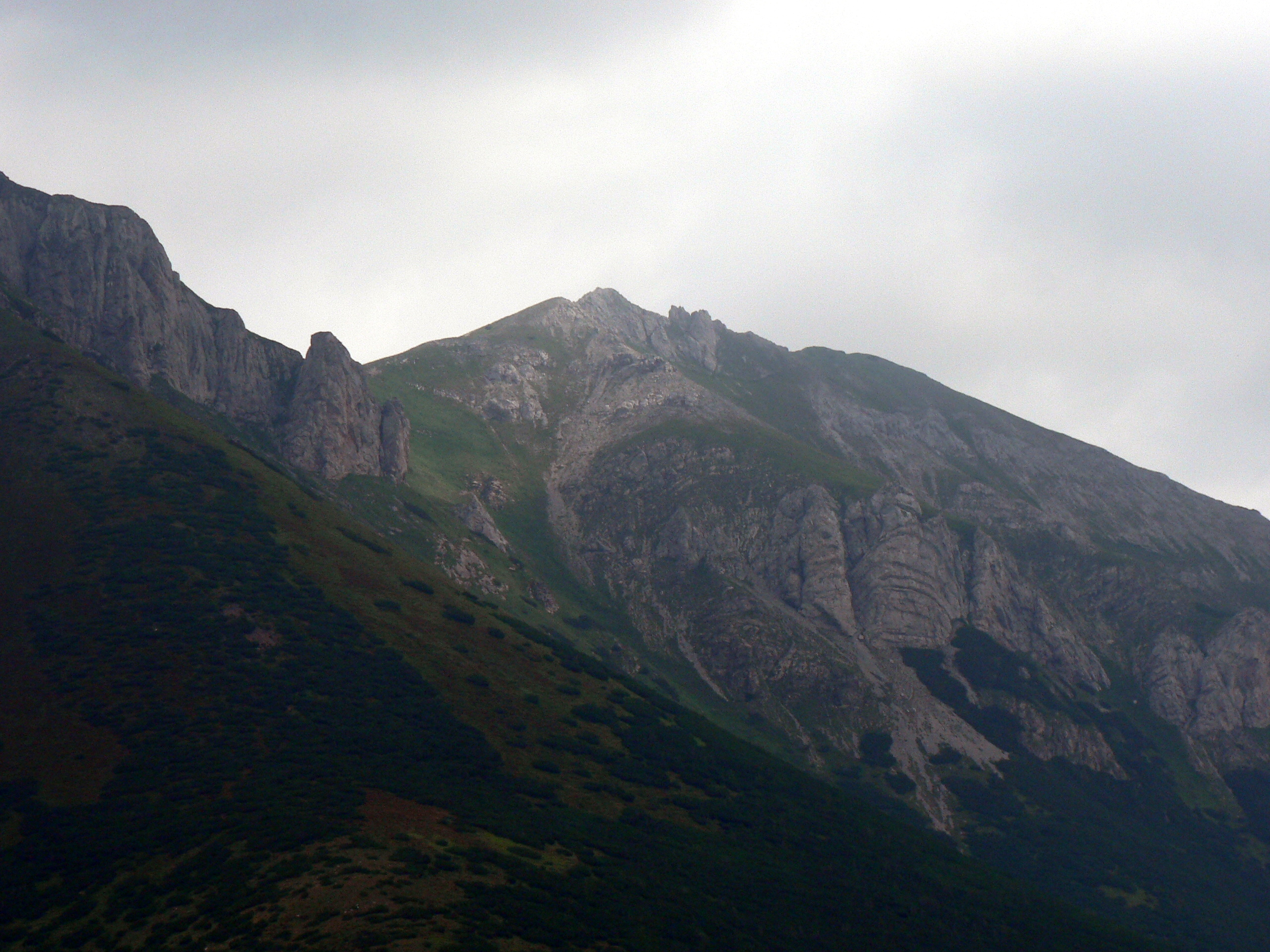 Widok na Bujaczy Wierch z Doliny Kieżmarskiej